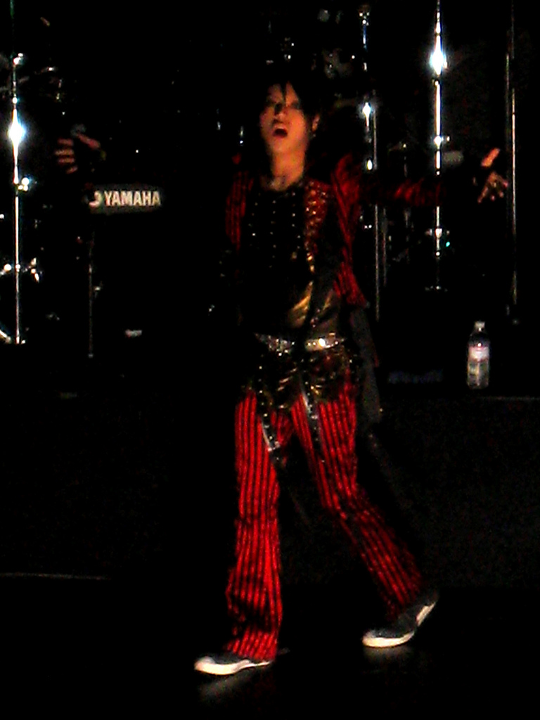 Shou